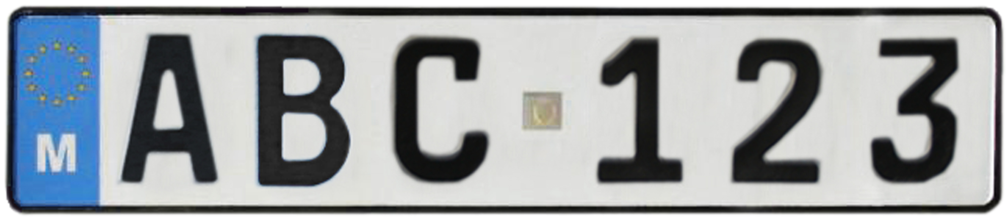 plaque d'immatriculation maltaise type